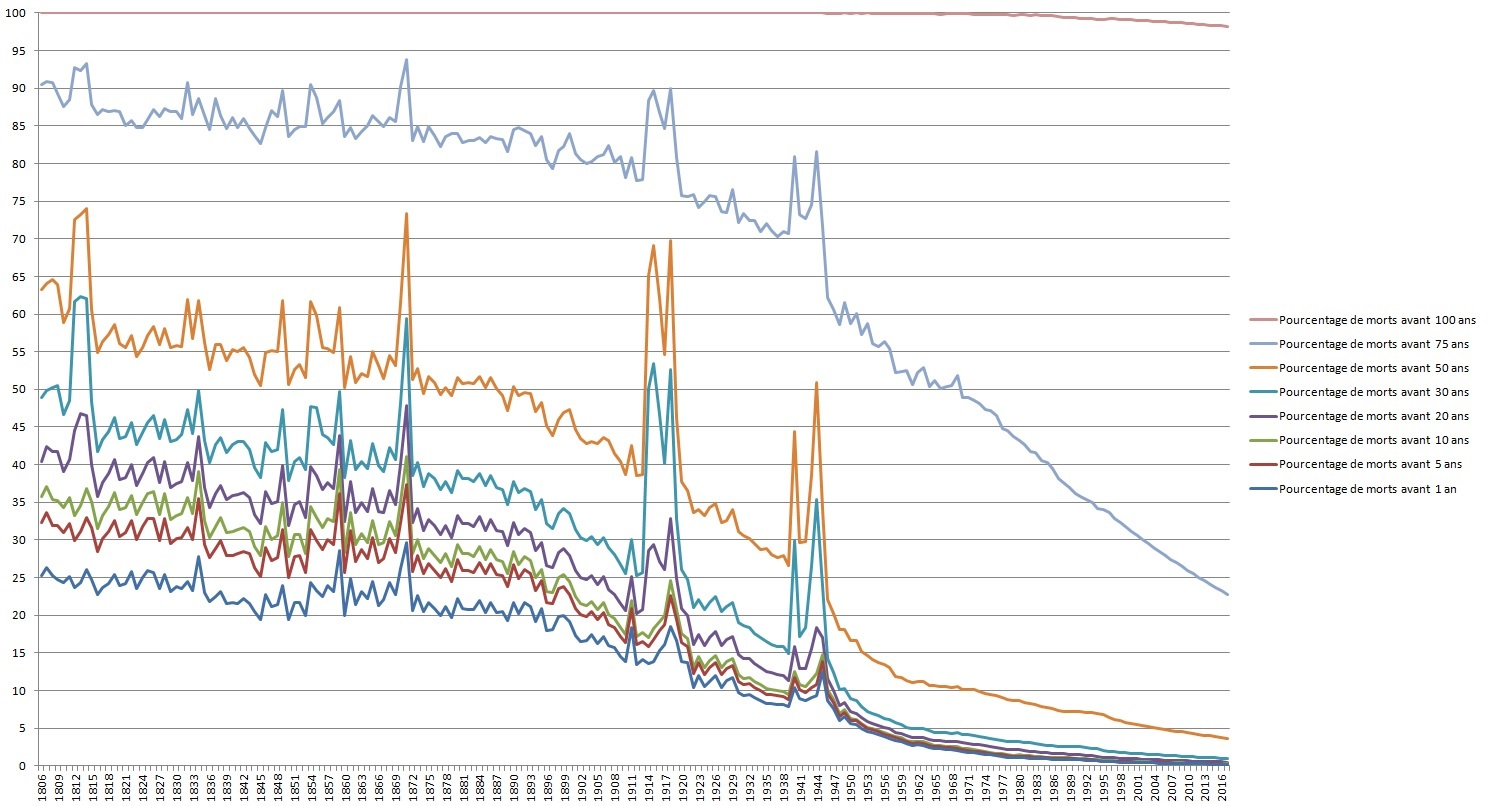 Évolution du pourcentage de la population mort avant d'avoir atteint un âge donné (1 an, 5 ans, 10 ans, 20 ans, 30 ans, 50 ans, 75 ans, 100 ans) de 1806 à 2017 (Source: INED)